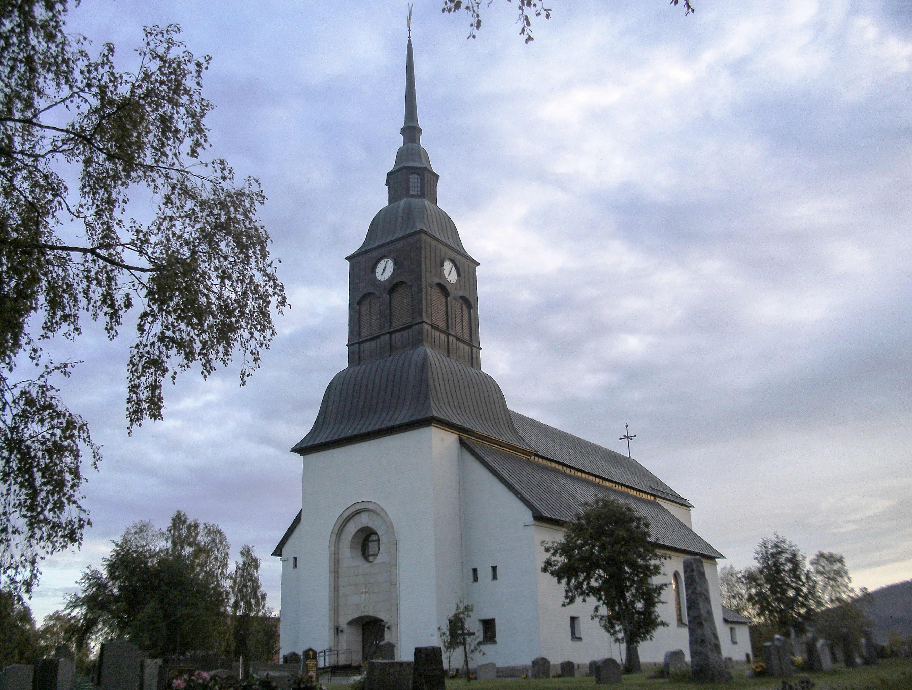 Överkalix kyrka. Bilden har redigerats